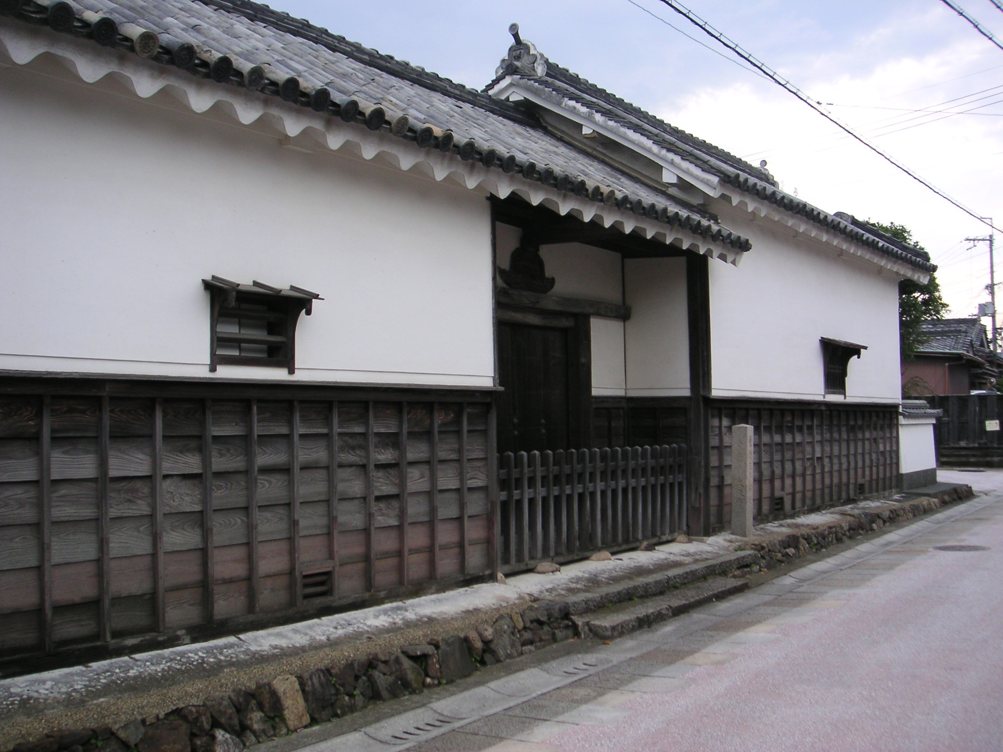 投稿者本人による撮影（2007年9月9日撮影）Kayano Sanpei Former Residence, Minoh, Osaka, Japan 長屋門を東外側から撮影。 貴重な長屋門が旧西国街道（現国道171号線）の辺に当時のまま残されている。